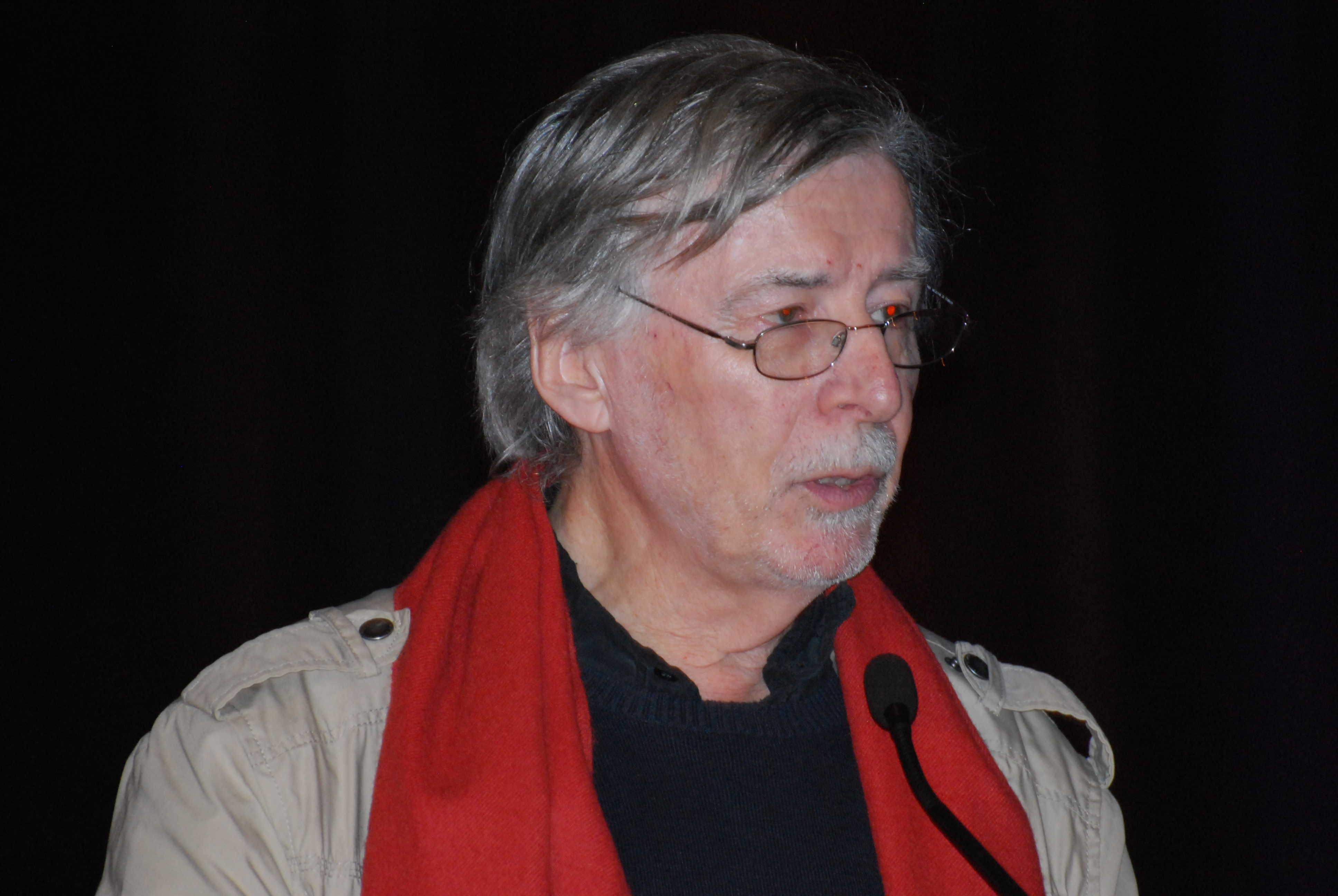 Hervé Fischer au Forum international des sciences sociales 2013 à Montréal.